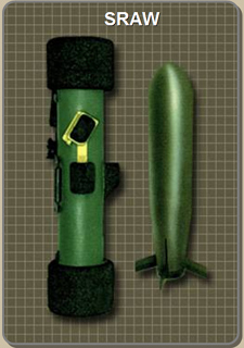 FGM-172 SRAWのコンピュータグラフィックス画像。